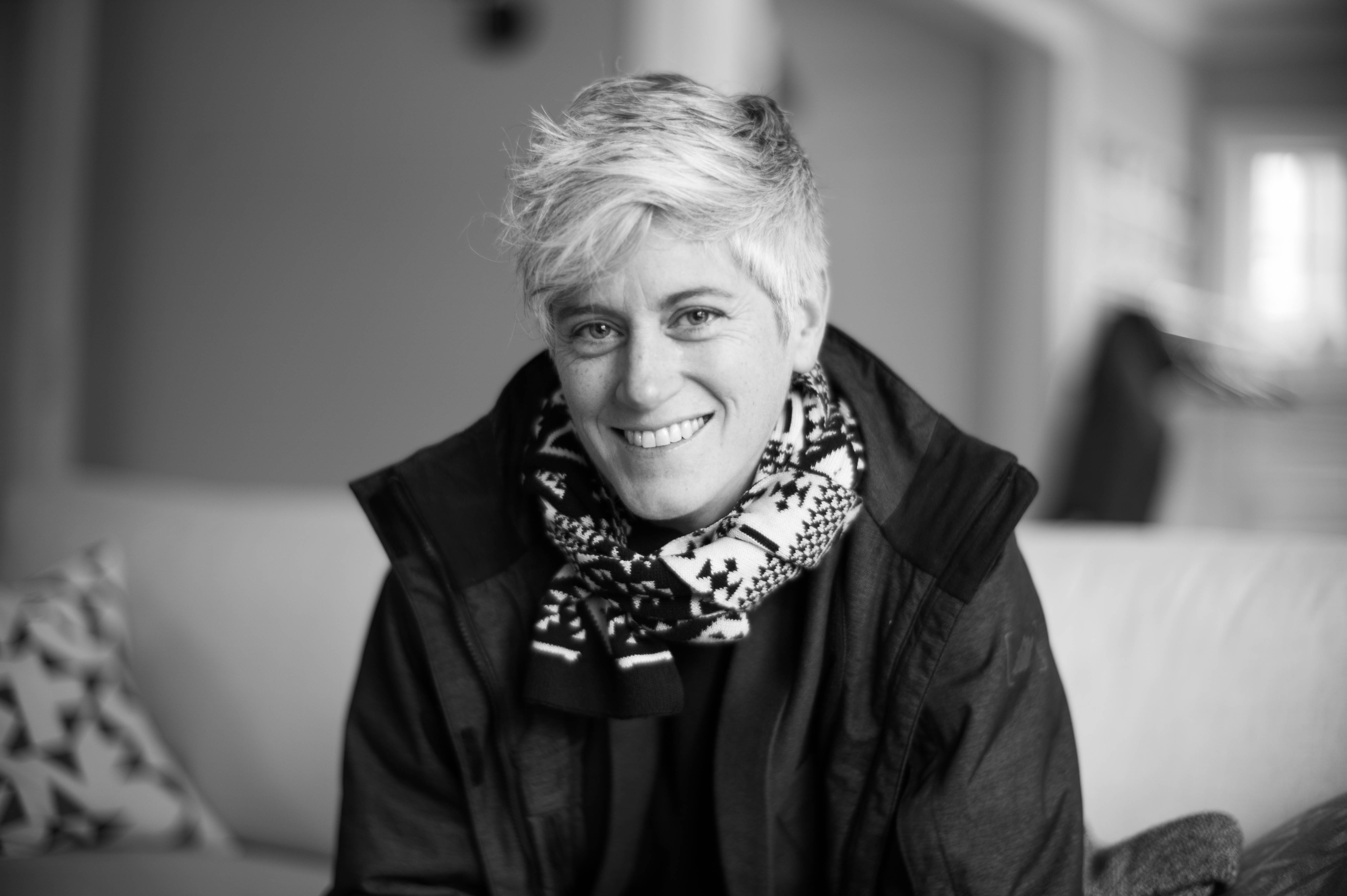 Colleen Macklin, Cambridge, 2014-01-10